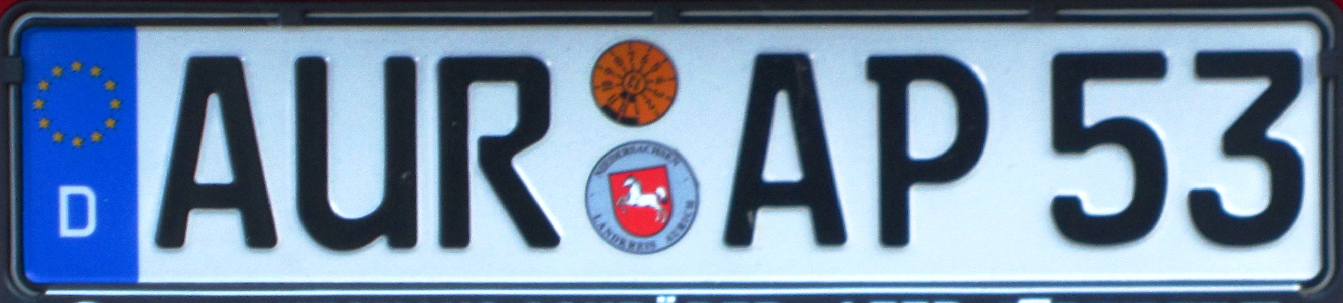 AUR AP 53